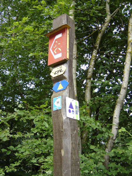 Weeweiser um Bieleser Gaalgebierg. Allgemenges zum Bild: Dëst Bild weist e Weeweiser um Bieleser Gaalgebierg.